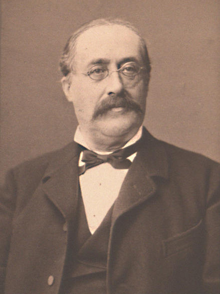 Dusch, Theodor Freiherr von